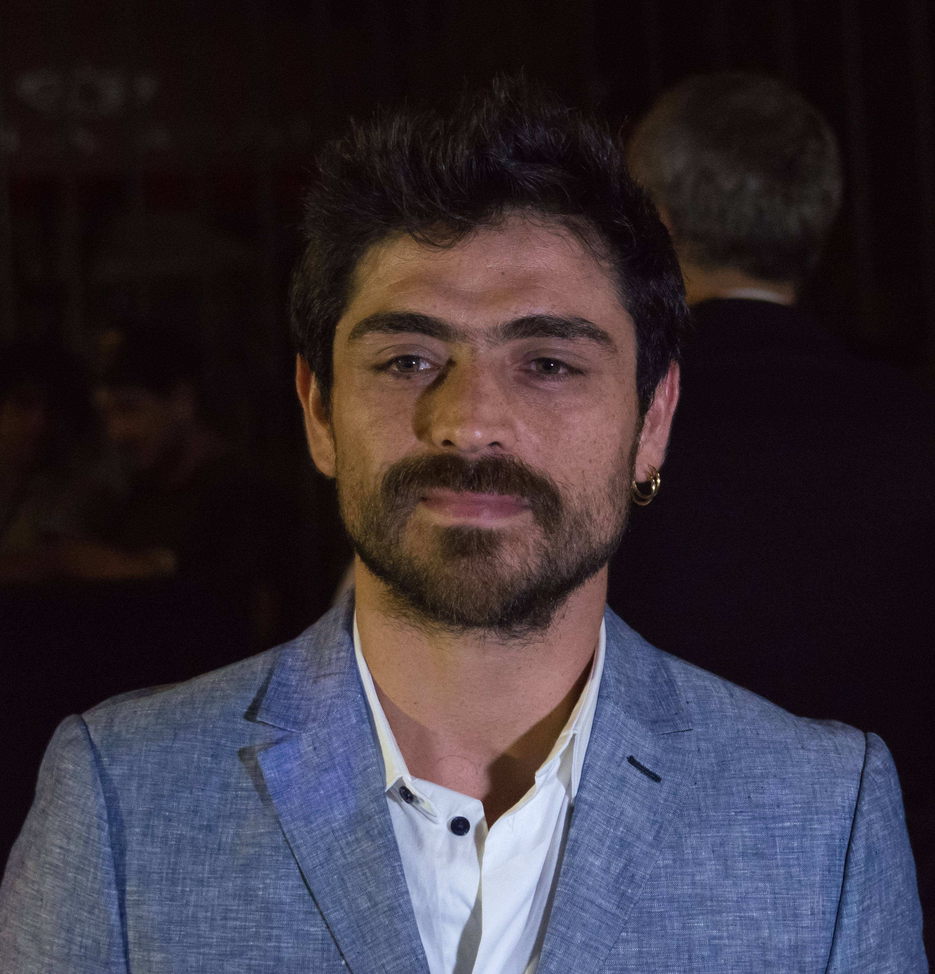 Etienne Bobenrieth, Premios Caleuche, Teatro Oriente, Providencia, Santiago, Región Metropolitana de Santiago, Chile.